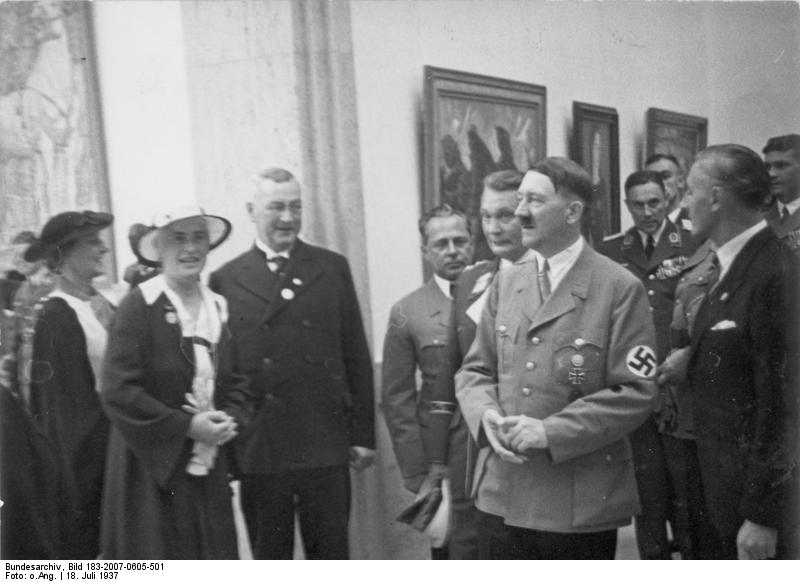 Tag der dt. Kunst im Haus der Dt. Kunst am 18.7.37, welcher gleichzeitig eingeweiht wurde